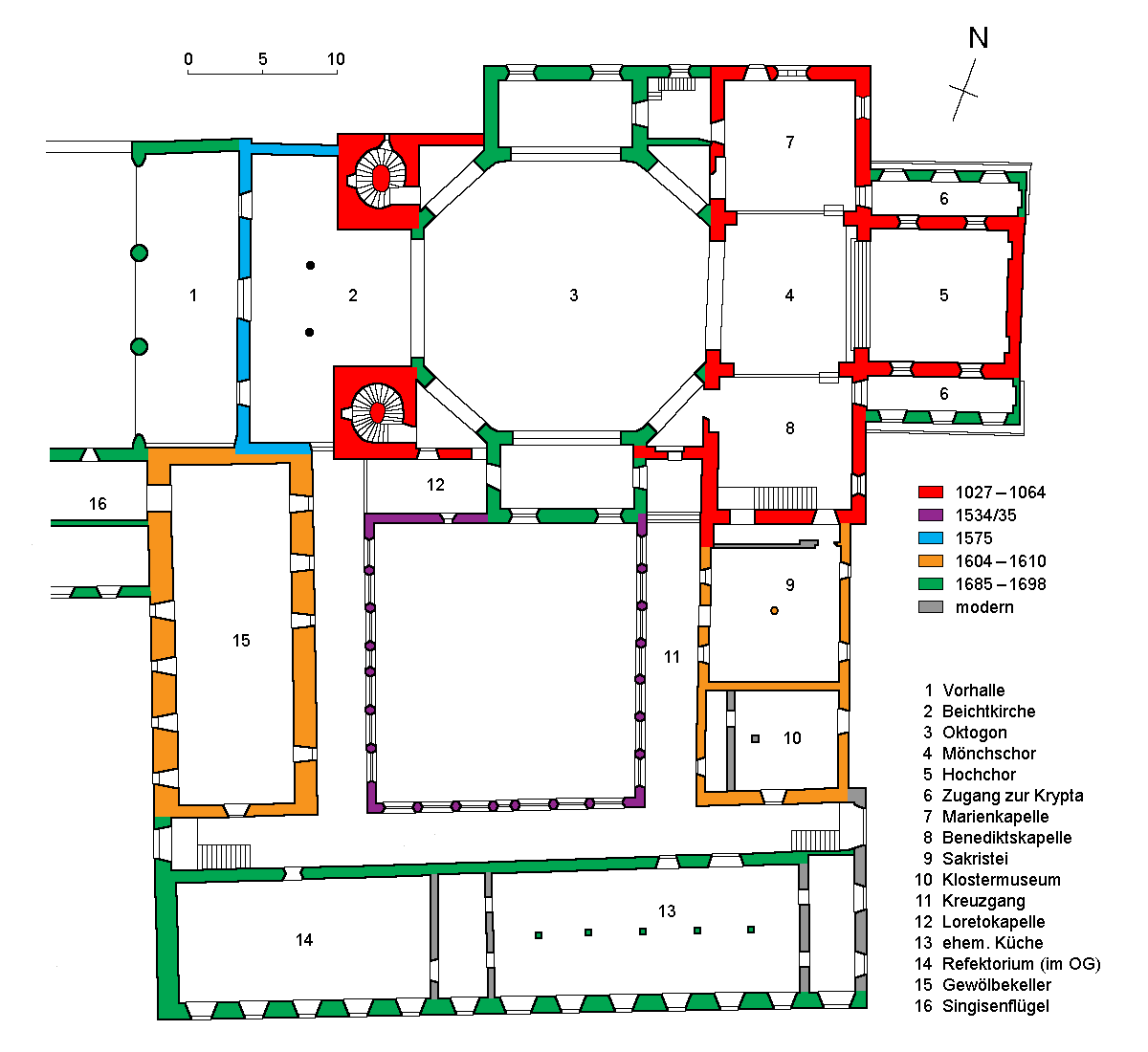 Kloster Muri: Grundriss von Klosterkirche und Kreuzgang